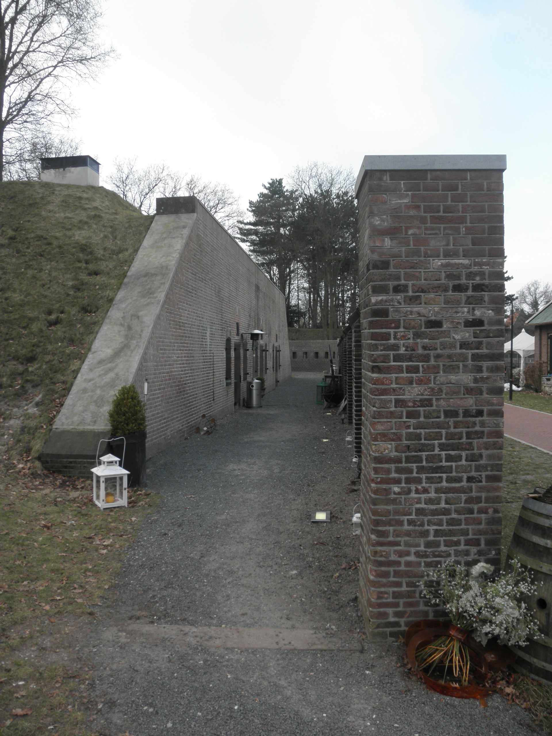 Bussum - Fort Werk 4 - bomvije gebouw aan de rechterflank van het fort met deel van de achtermuur